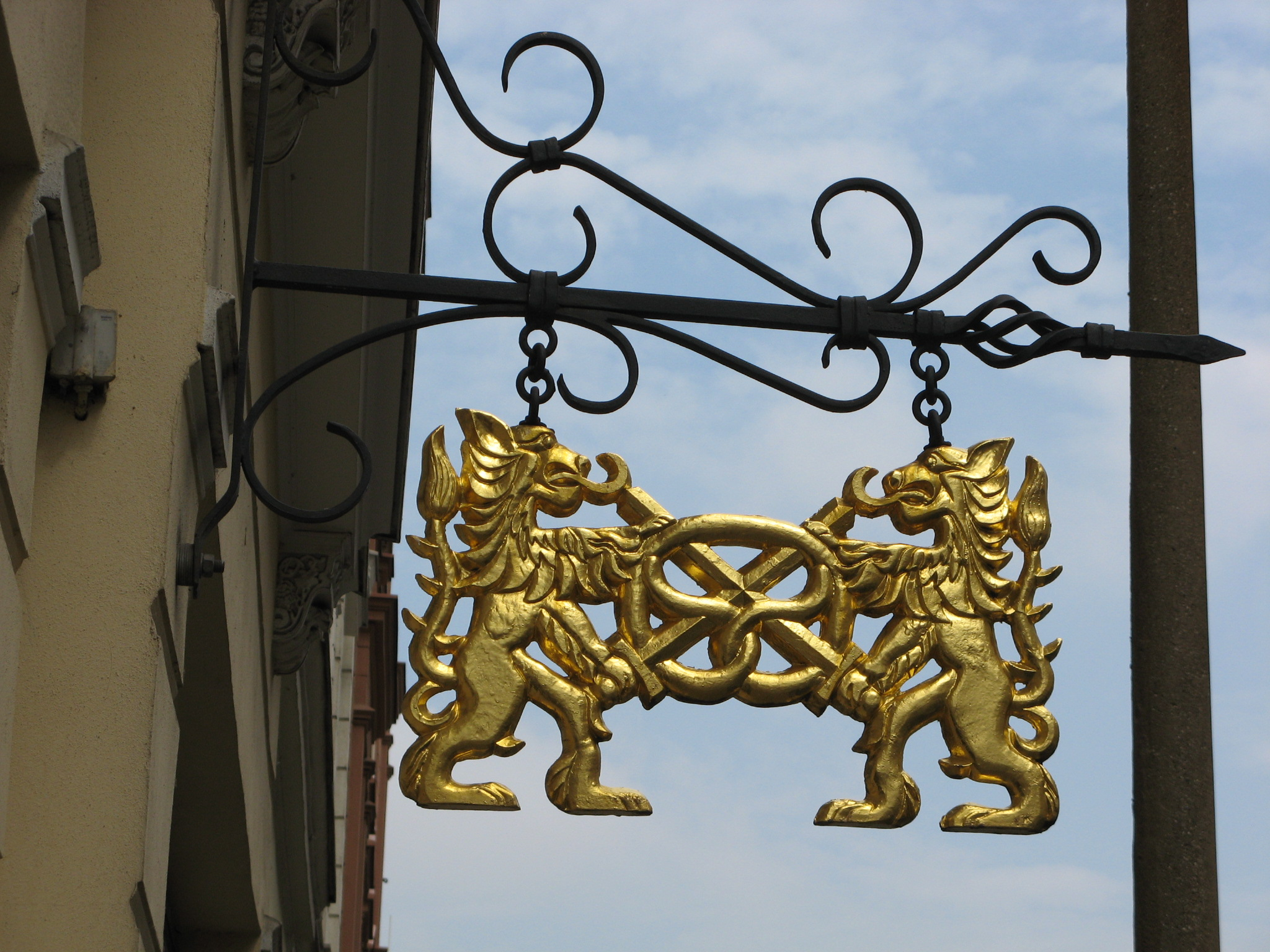 Zunftzeichen der Bäckergilde in Görlitz, Birmanckstraße